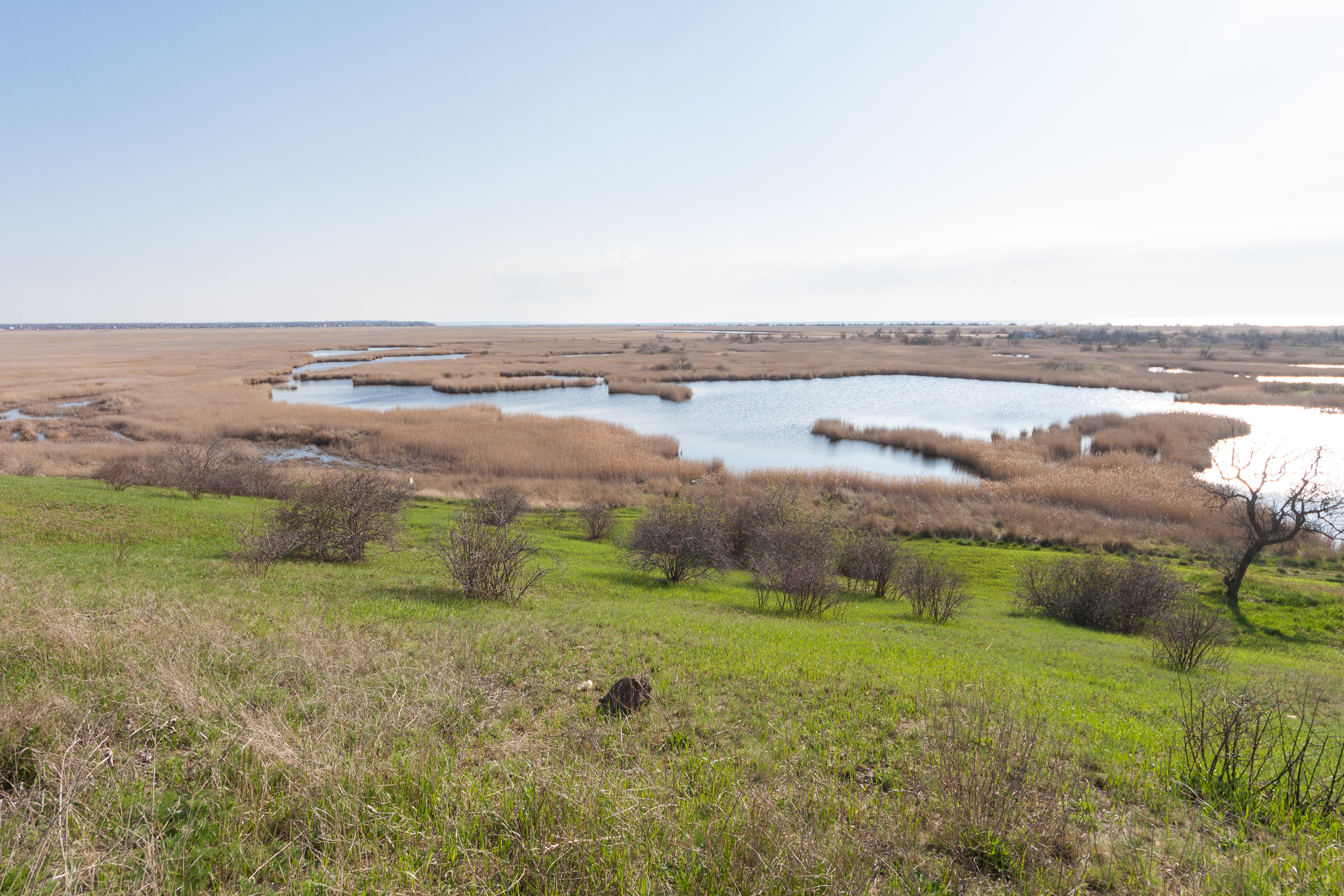 Заплава річки Берда, Приазовський національний природний парк